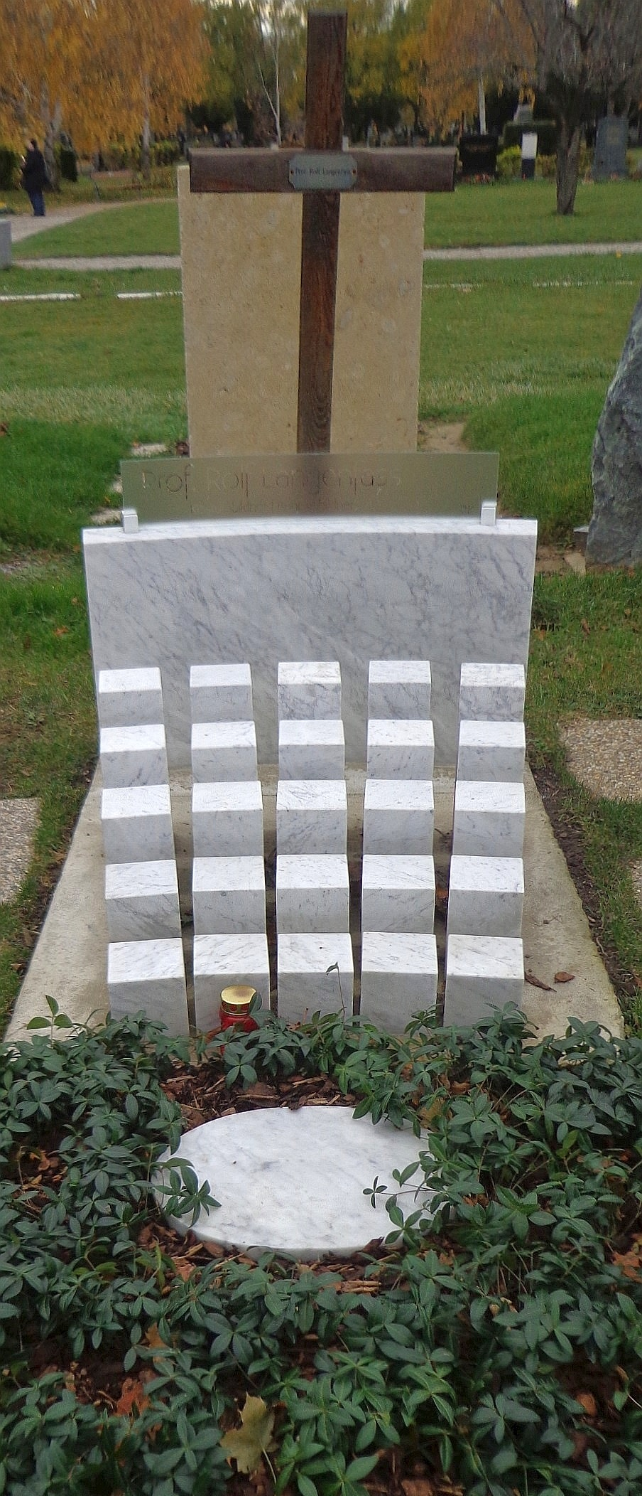 Wiener Zentralfriedhof - Gruppe 40: ehrenhalber gewidmetes Grab von Rolf Langenfass